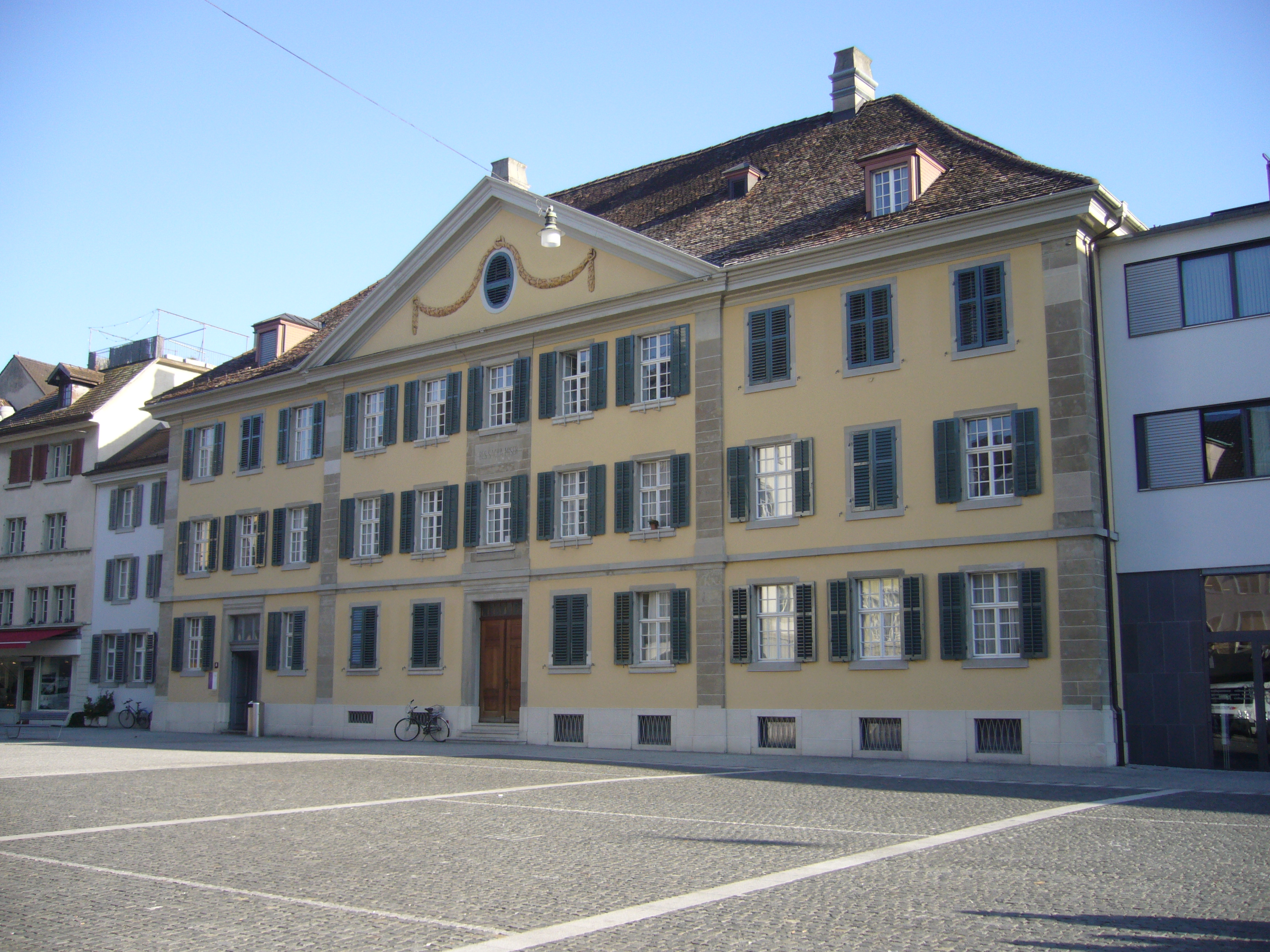 Blick vom Rindermarkt aufs ehmalige untere Spital, erbaut 1806/’14 von Salomon Sulzer (1751—1807); heute Altersheim.